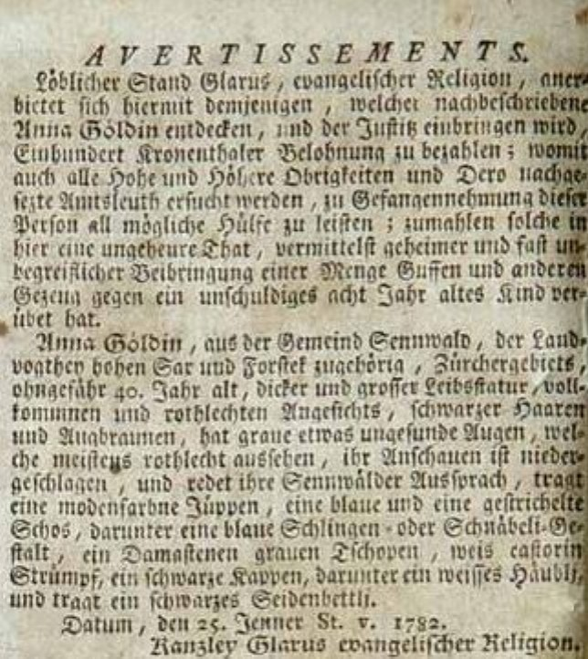 NZZ vom 9.2.1782